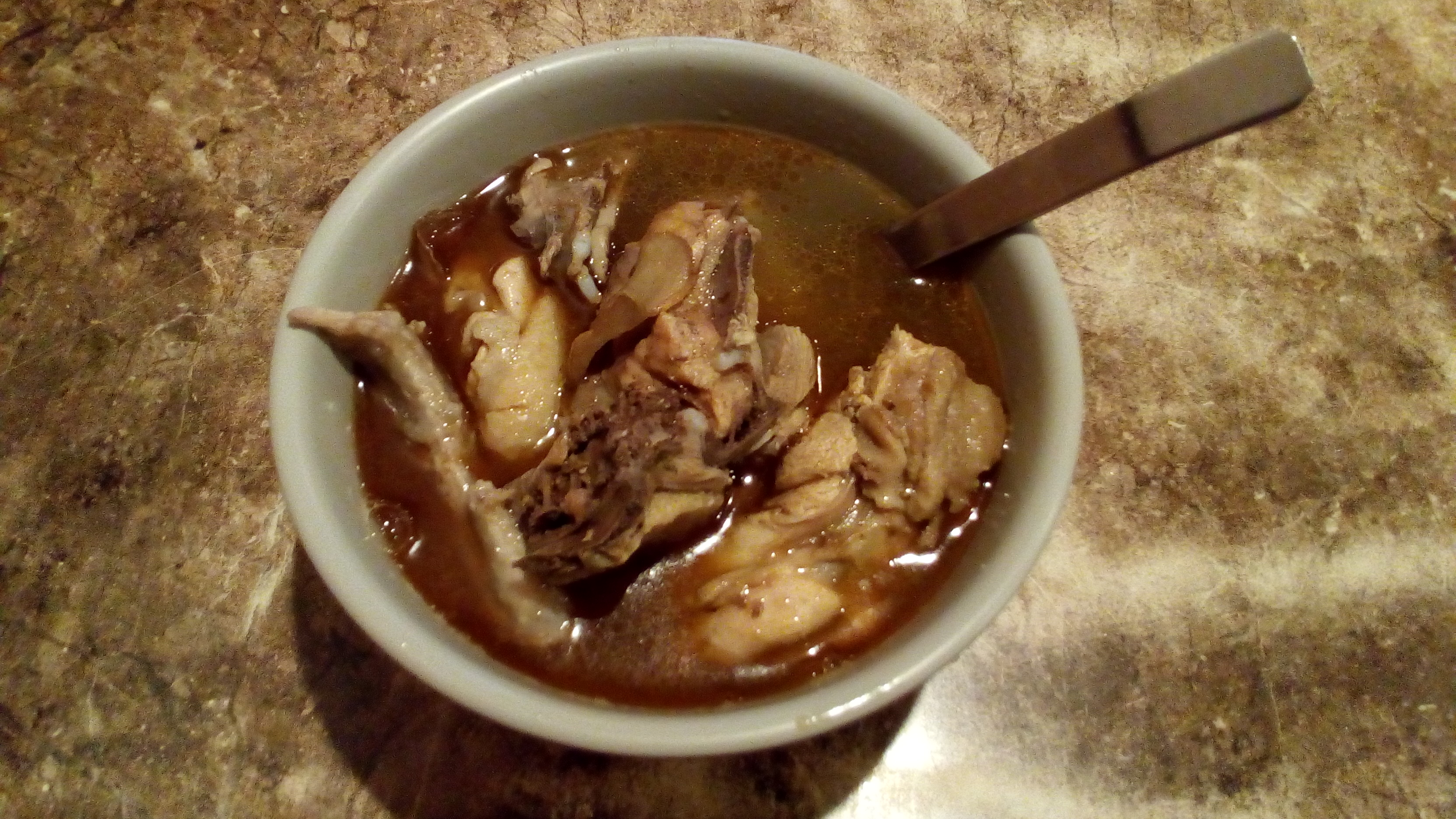 一碗油香酒香皆濃郁的麻油雞堪稱經典臺灣美食。